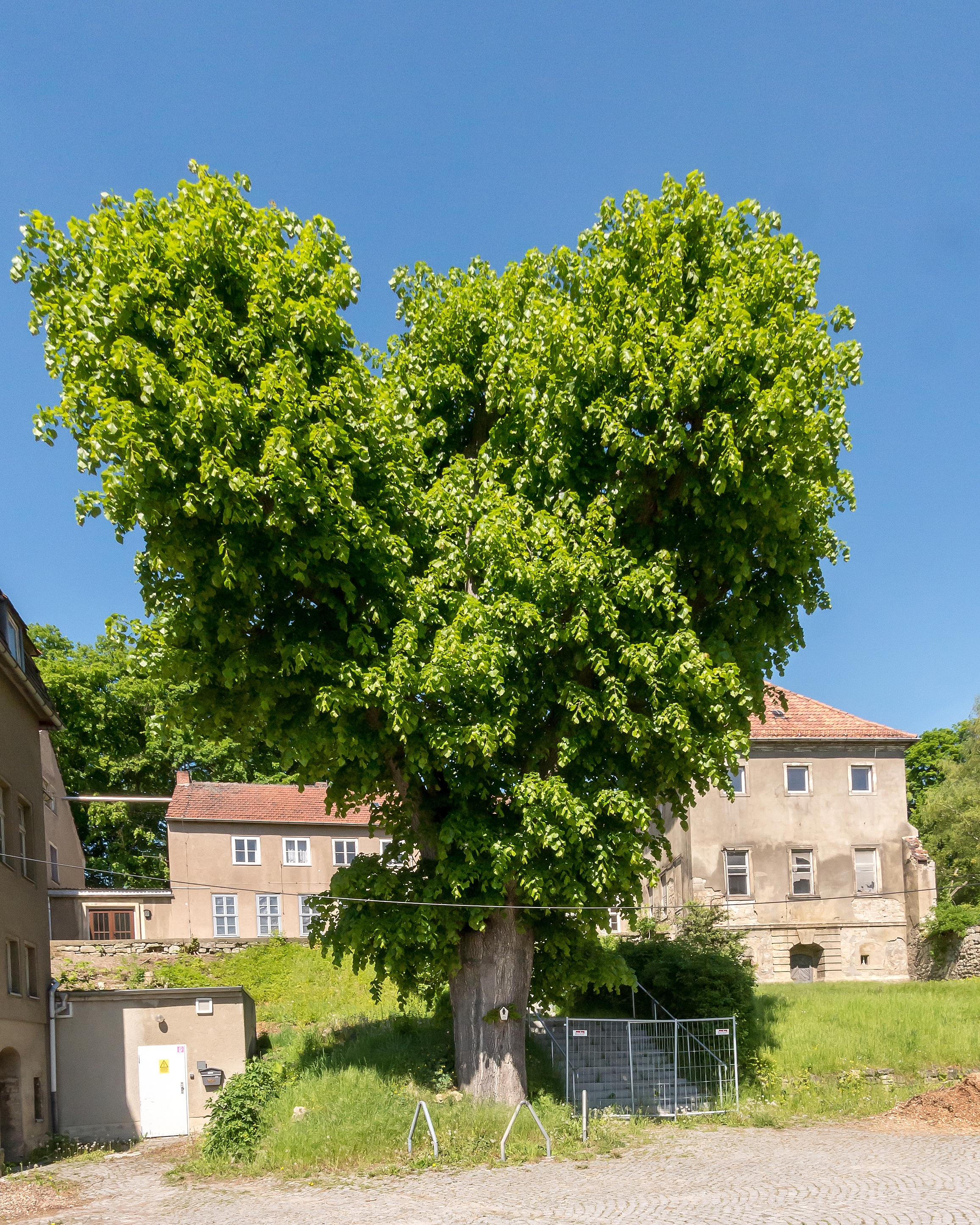 Sommerlinde Doc.-Nr. 1996-16 DE-TH Jena-Zwätzen III